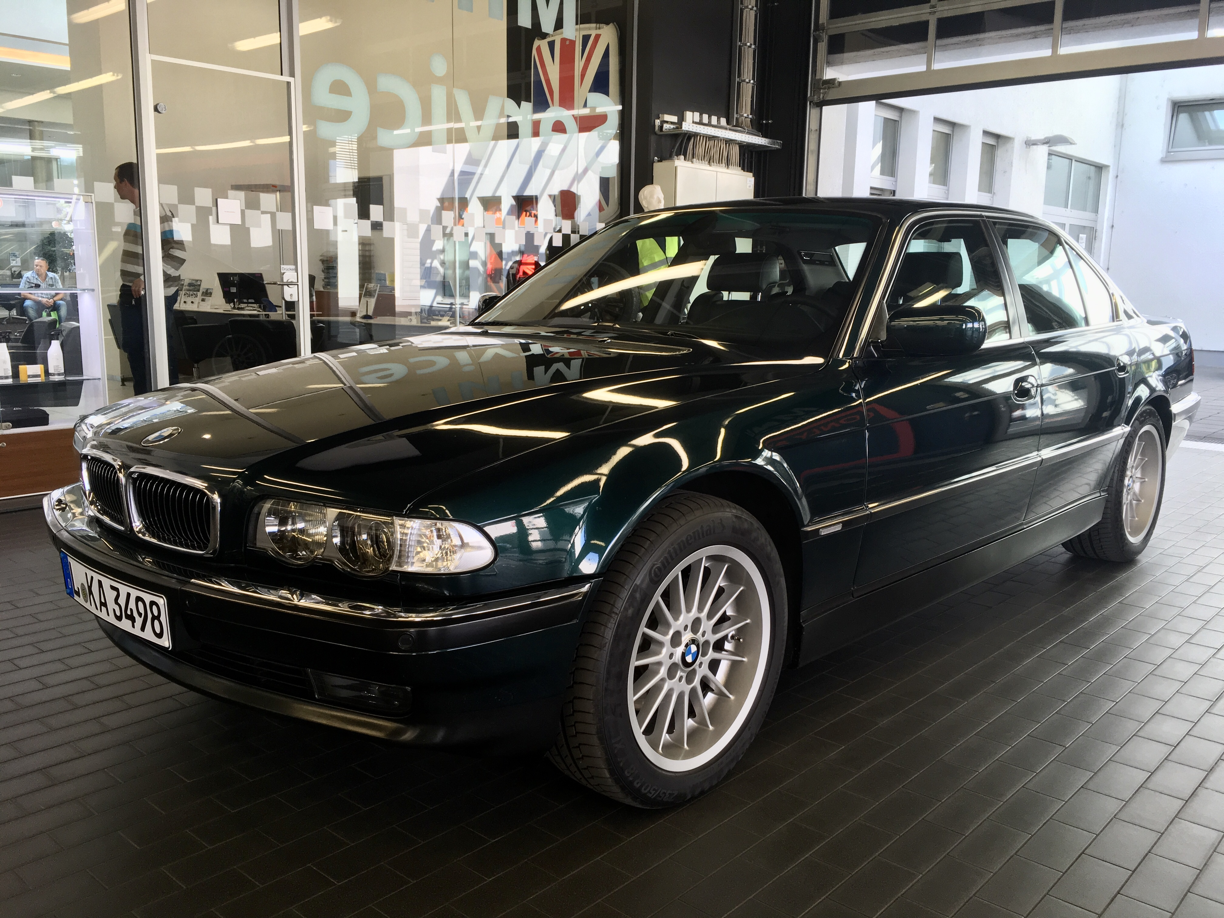 BMW E38 oxfordgrün